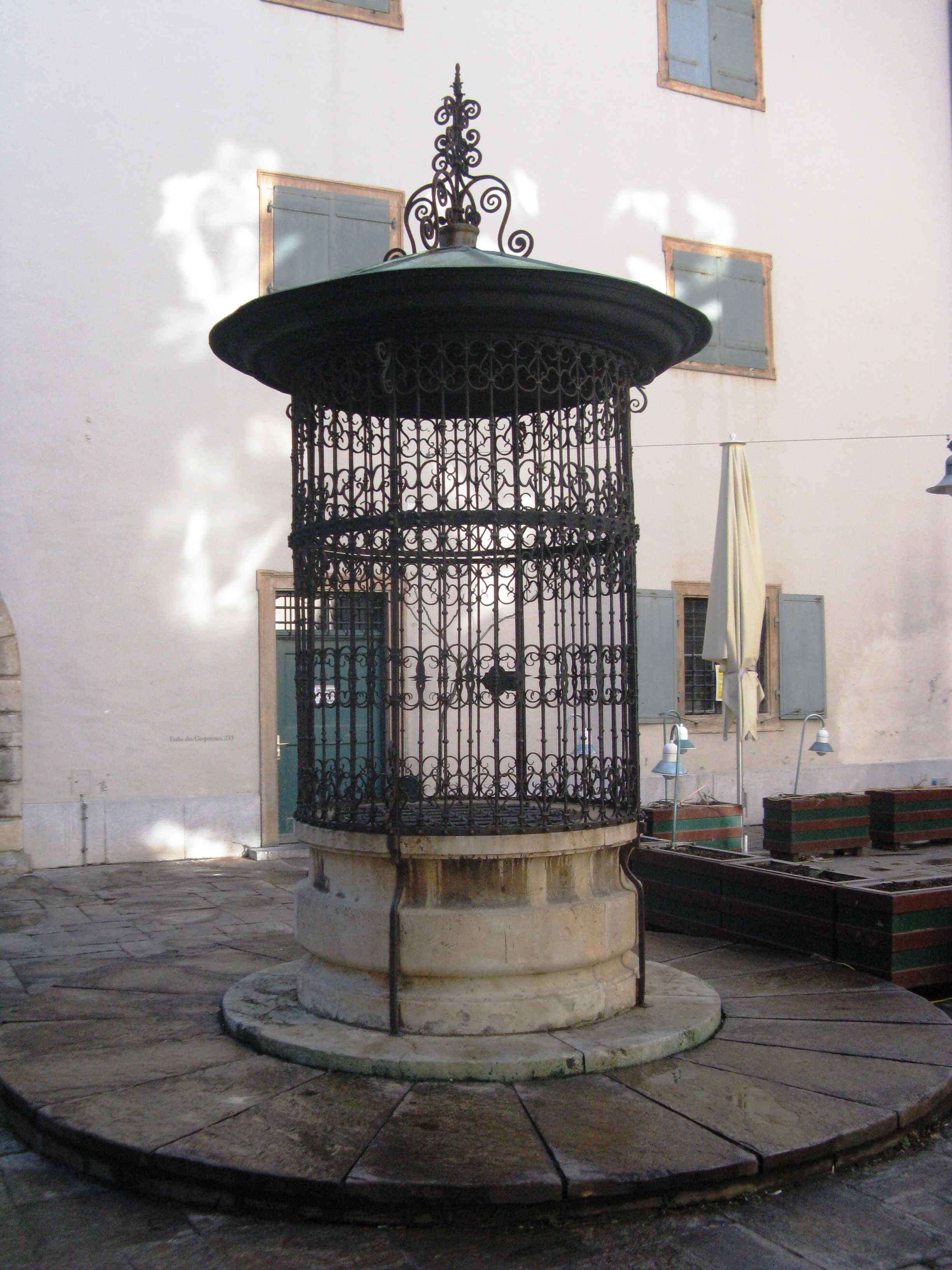 Brunnenlaube im kleinen Landhaushof, Graz